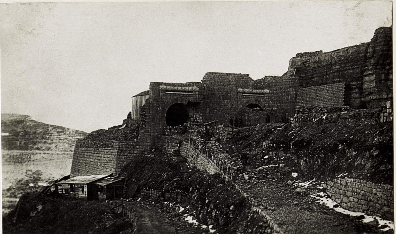 Campomolon.